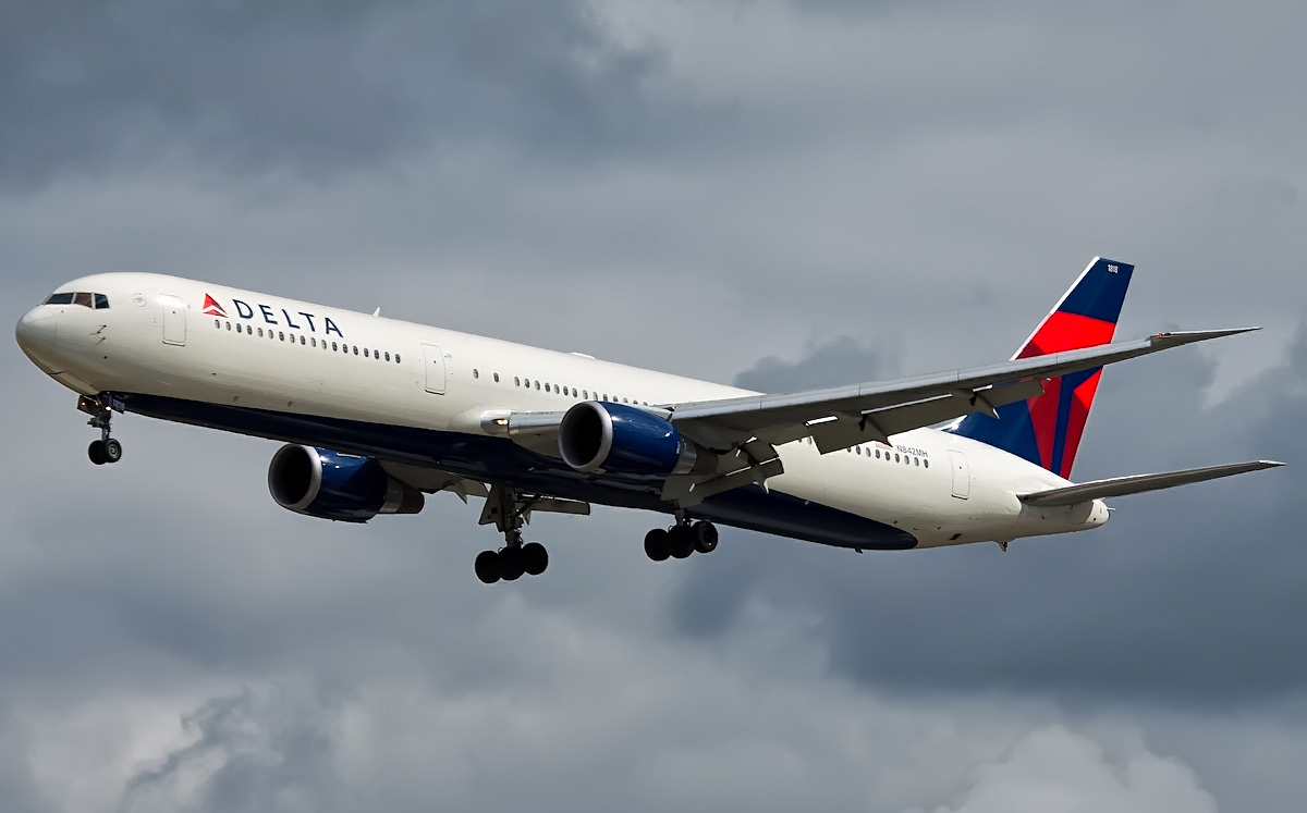 N842MH - AB8862 - Delta Airlines - Boeing 767-432ER (29715)